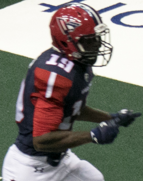 Valor 47 / Philadelphia Soul 48